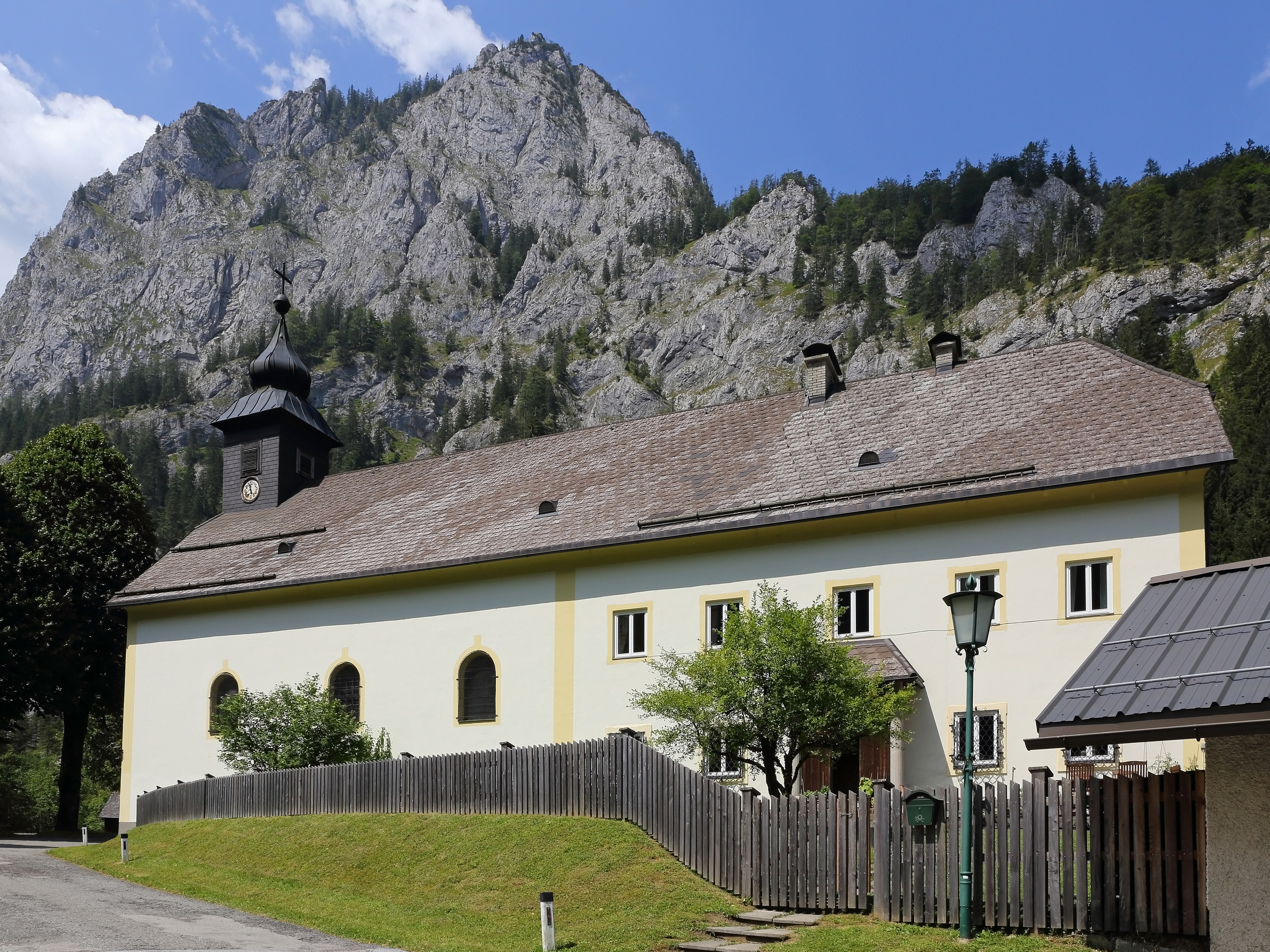 Kath. Filialkirche hl. Johannes in der Wüste und Pfarrhof in Weichselboden. Im Hintergrund: der Ameiskogel (1471 m)